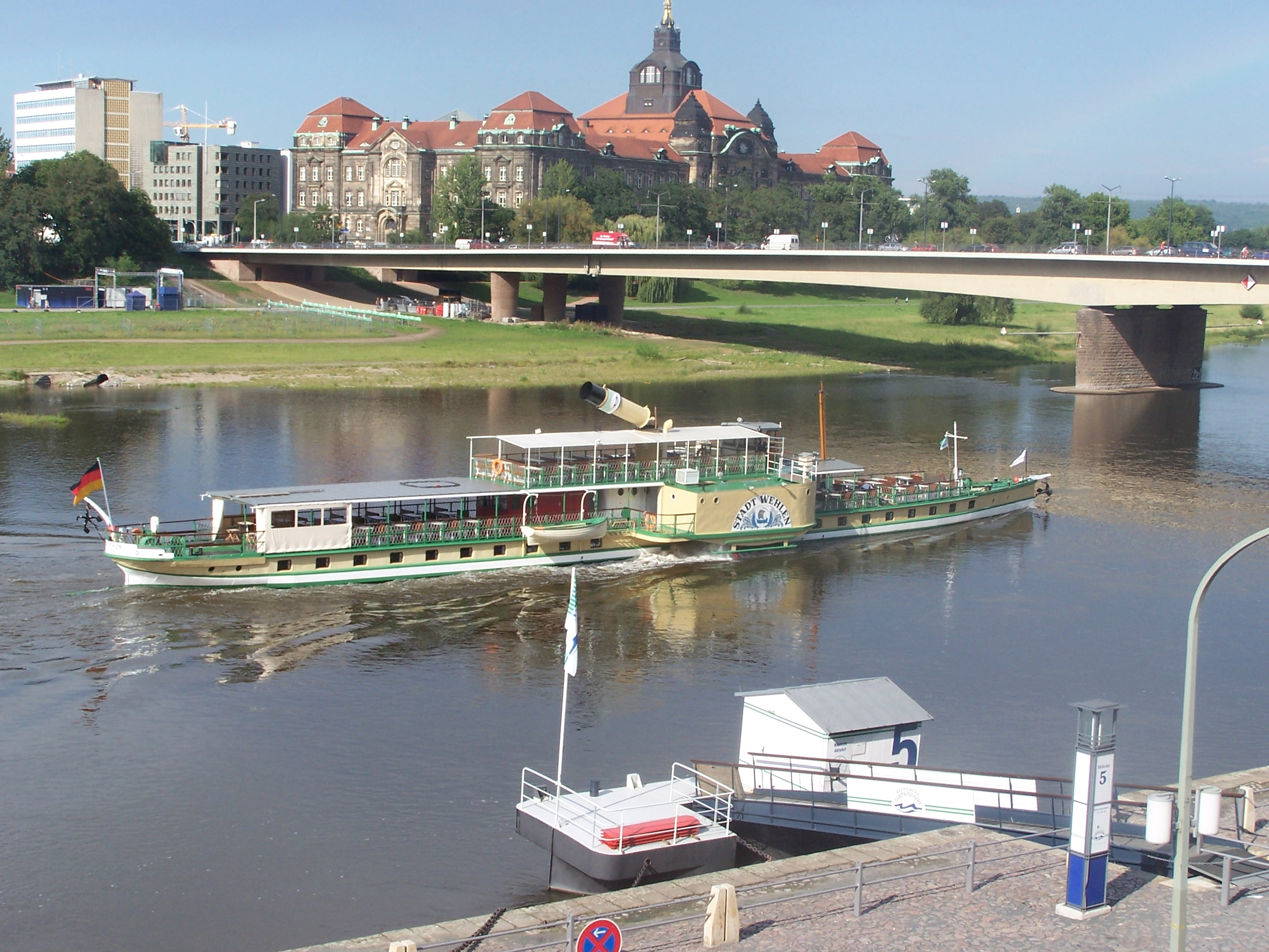 Schaufelraddampfer "Stadt Wehlen" der "Weißen Flotte" in Dresden vor dem Unterqueren der Carolabrücke